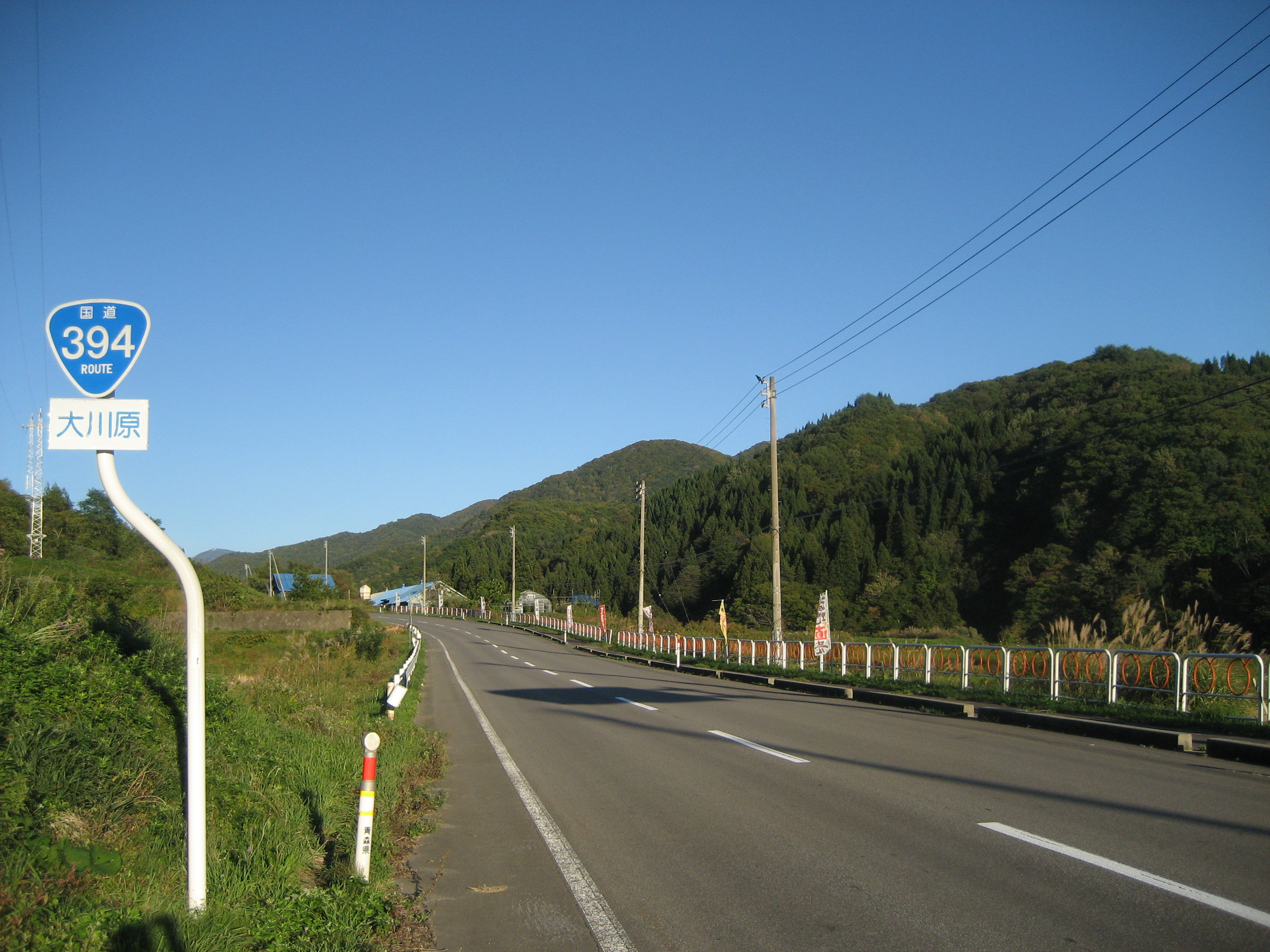 国道394号線青森県黒石市大川原付近